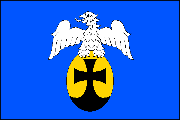 vlajka, Kvasiny, okres Rychnov nad Kněžnou